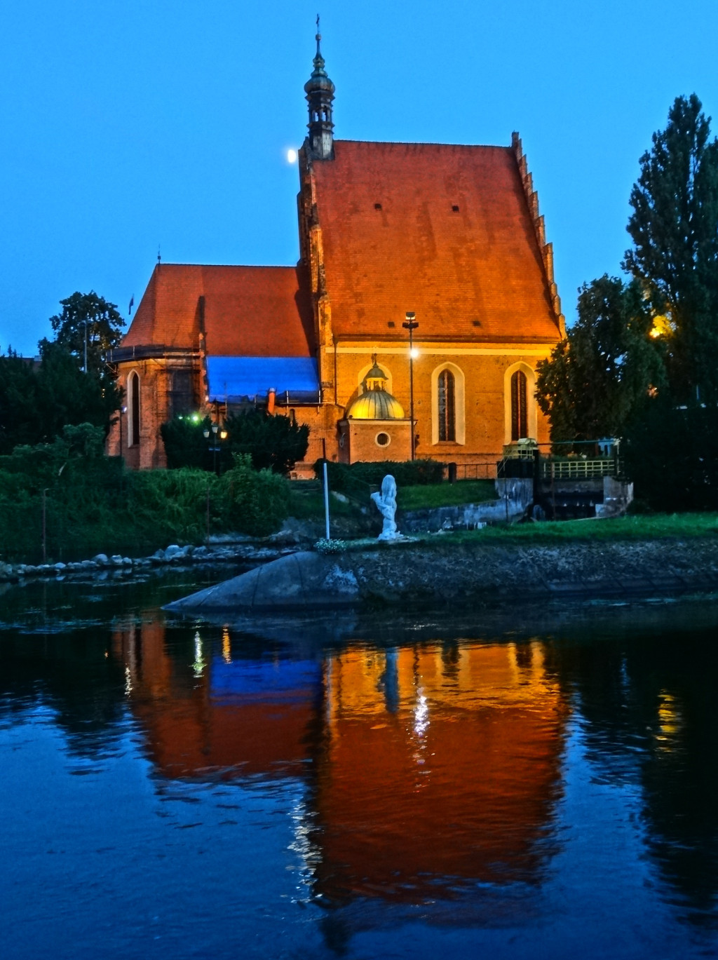 Katedra p.w. św. Marcina i Mikołaja w Bydgoszczy (XIV-XV wiek)